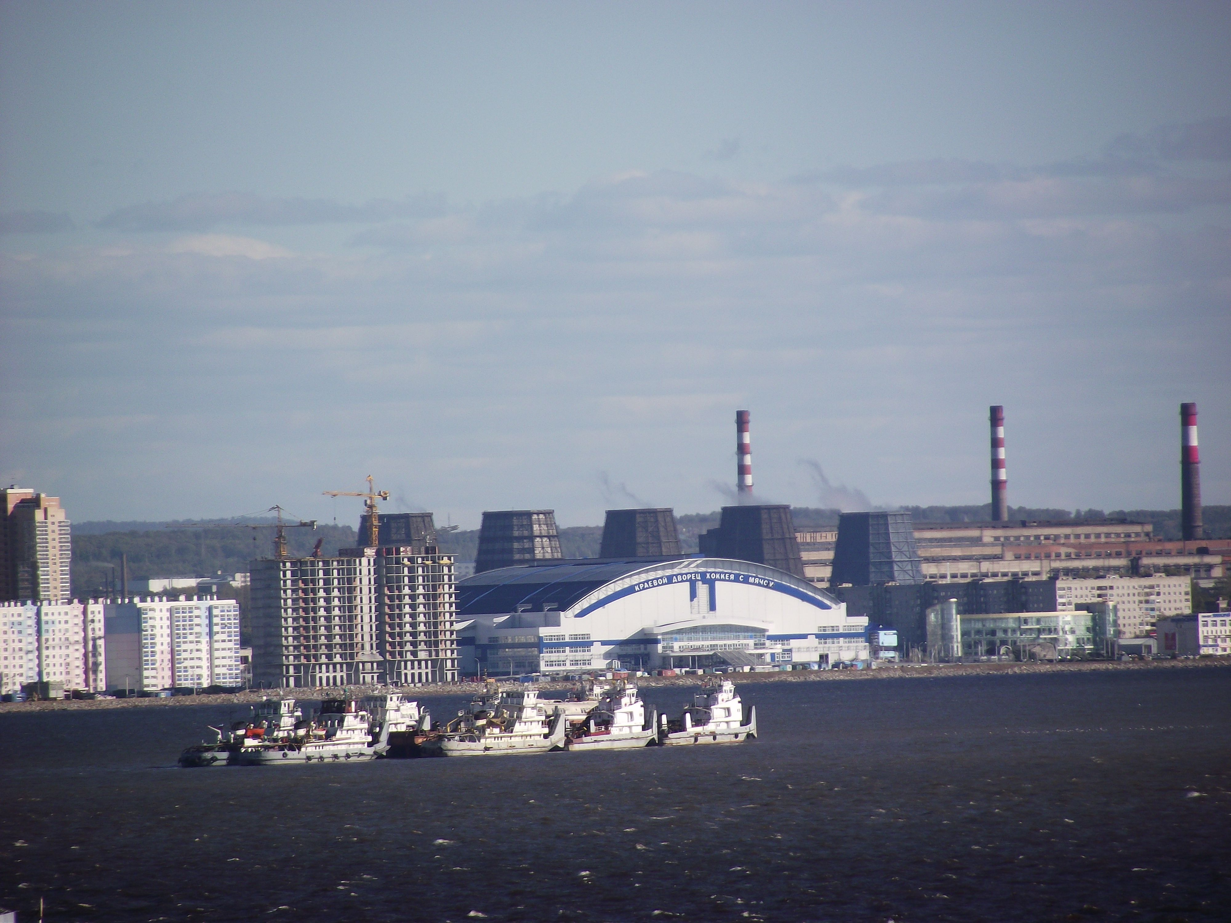 Буксиры на Амурской протоке в дни наводнения 2013 год